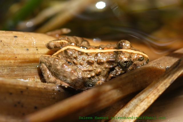 Rana limnocharis, India